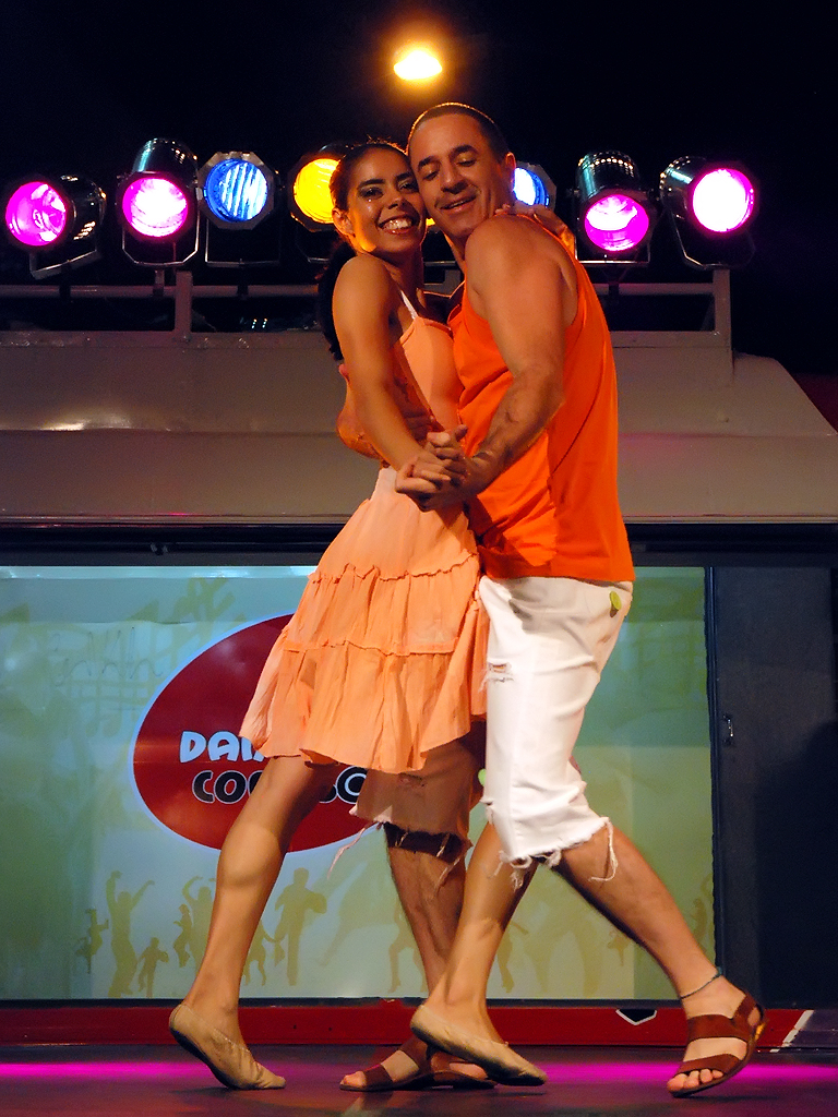 Foto: Natalia Bezerra.